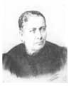 Una foto de la colchona, la mujer que mejoró los mantecados.